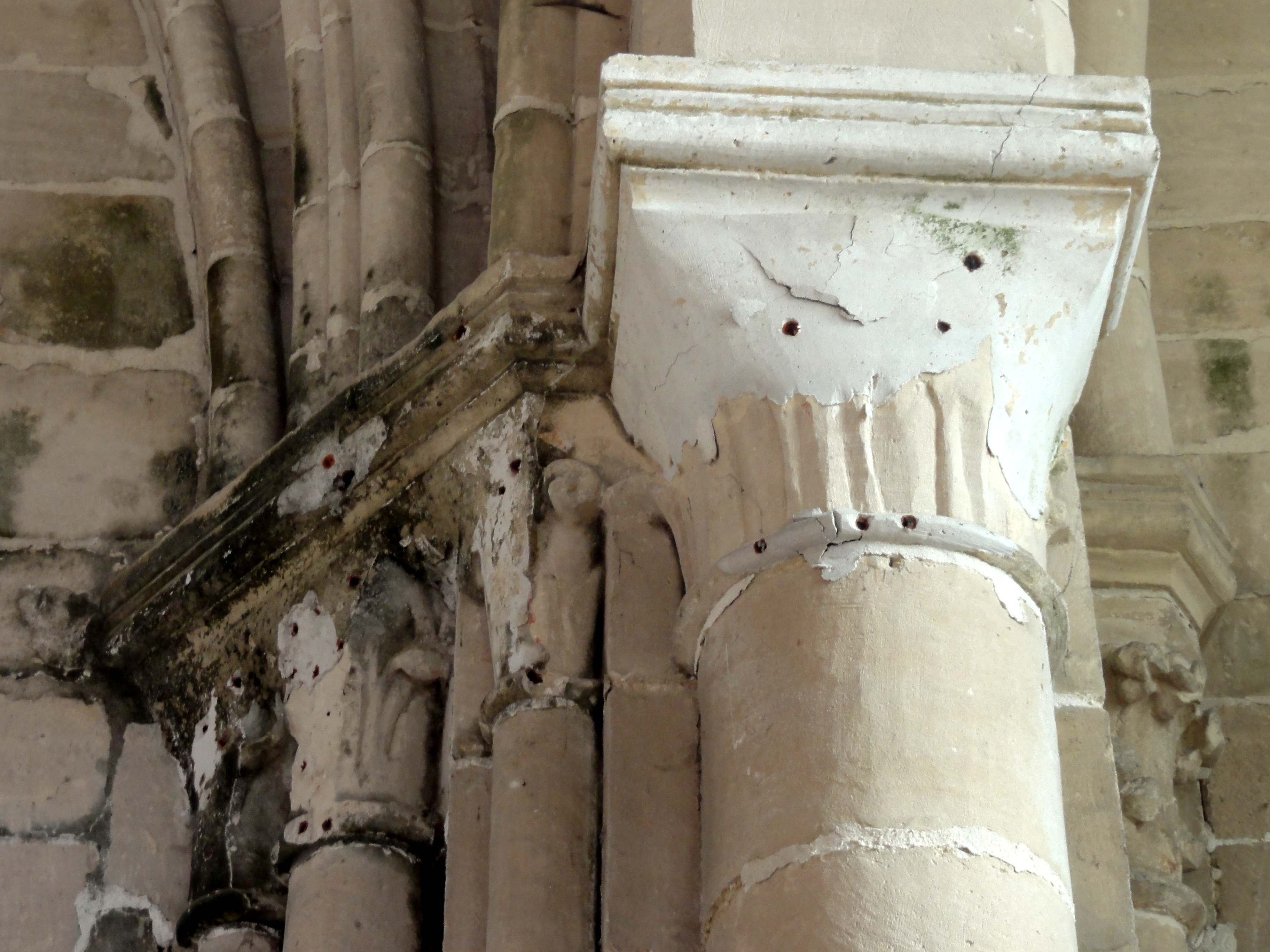 Croisillon nord, arcade vers la chapelle, chapiteaux côté nord.